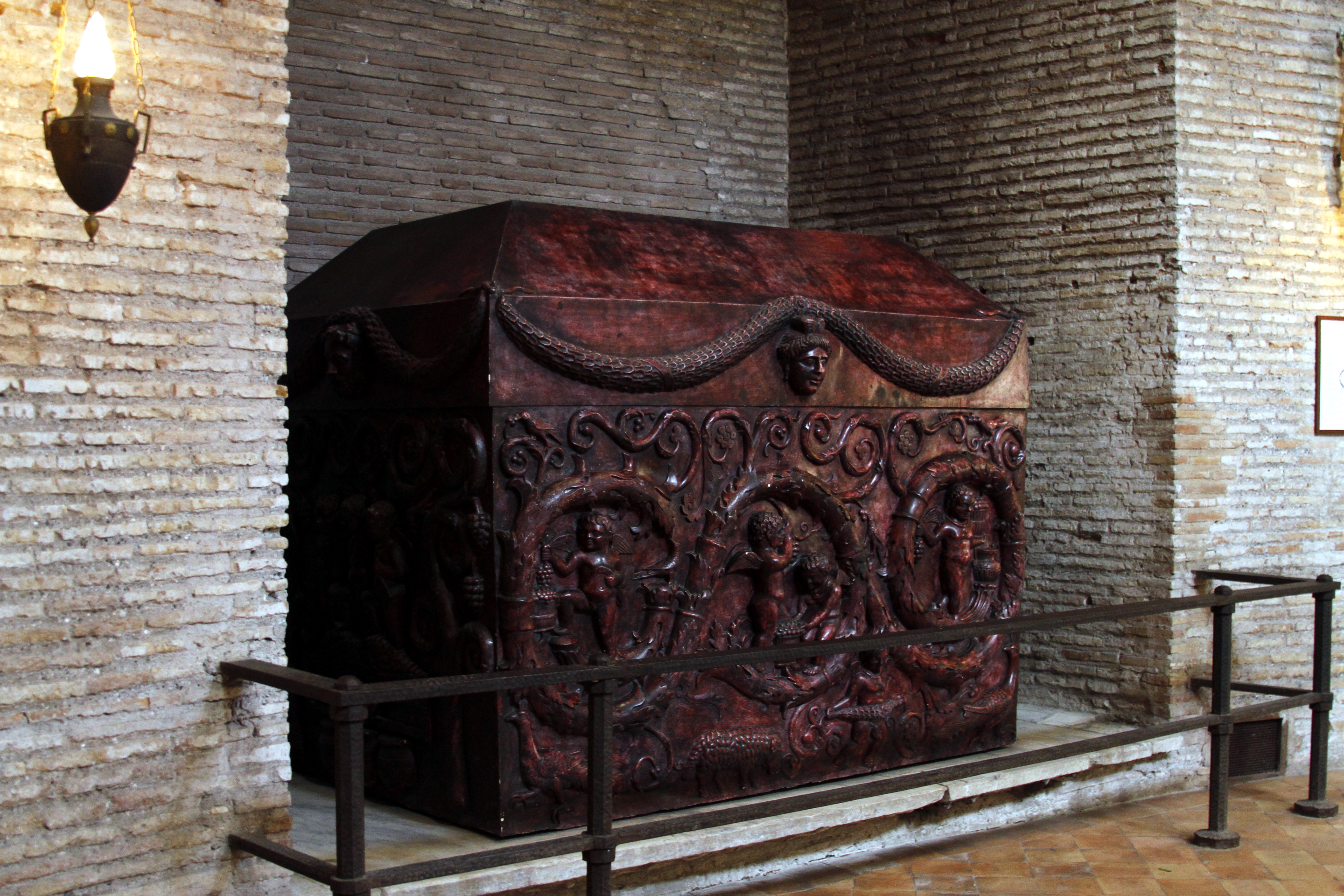 Santa Costanza - Rome